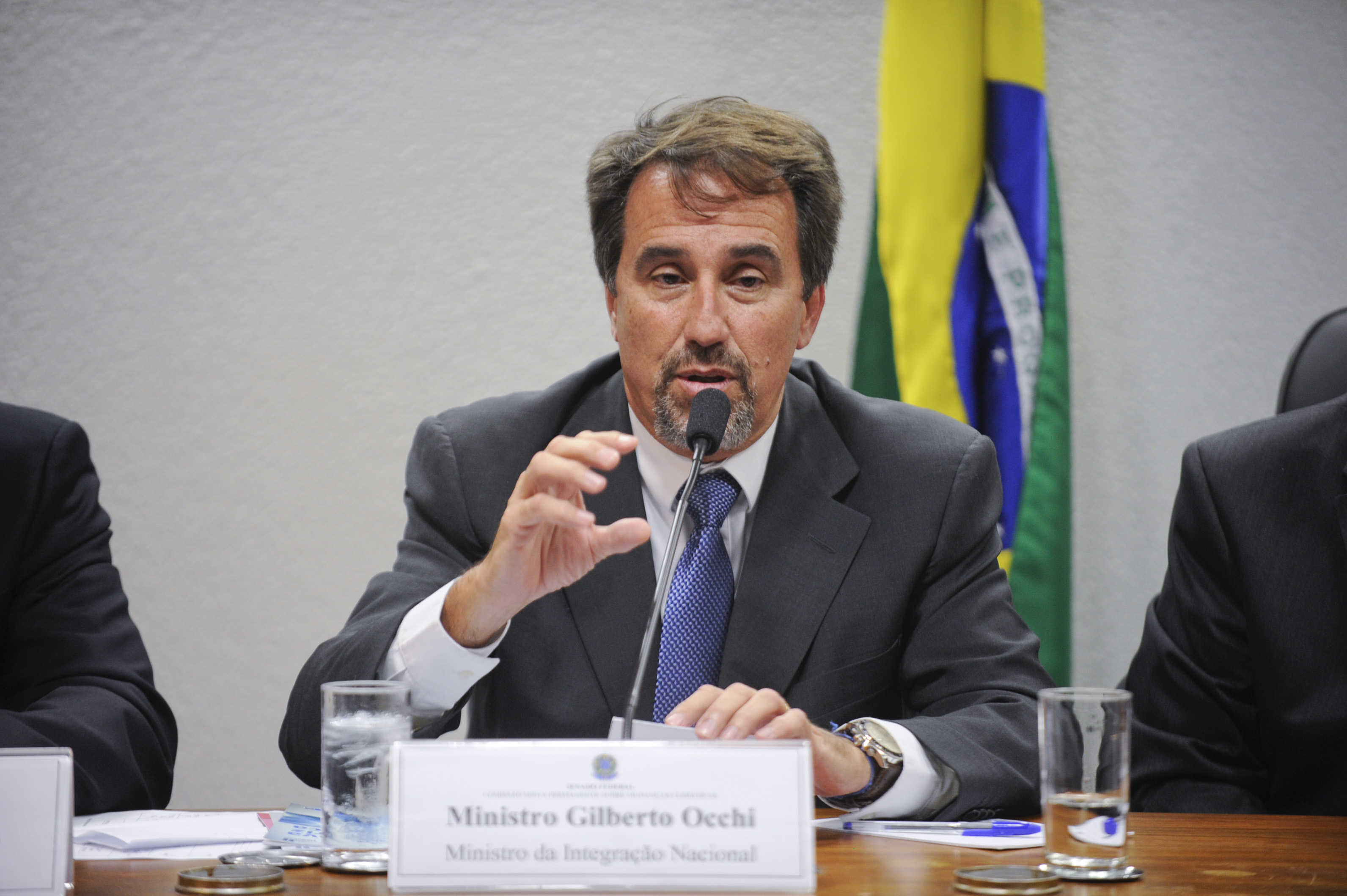 Sala de comissões do Senado Federal durante audiência pública realizada pela Comissão Mista Permanente sobre Mudanças Climáticas (CMMC) que recebe os ministros da Integração Nacional, Gilberto Occhi, das Cidades, Gilberto Kassab, e o diretor-presidente da ANA, Vicente Andreu Guillo, para debater a estrutura institucional para a gestão dos recursos hídricos. Em pronunciamento, ministro da Integração Nacional, Gilberto Occhi. Foto: Jefferson Rudy/Agência Senado